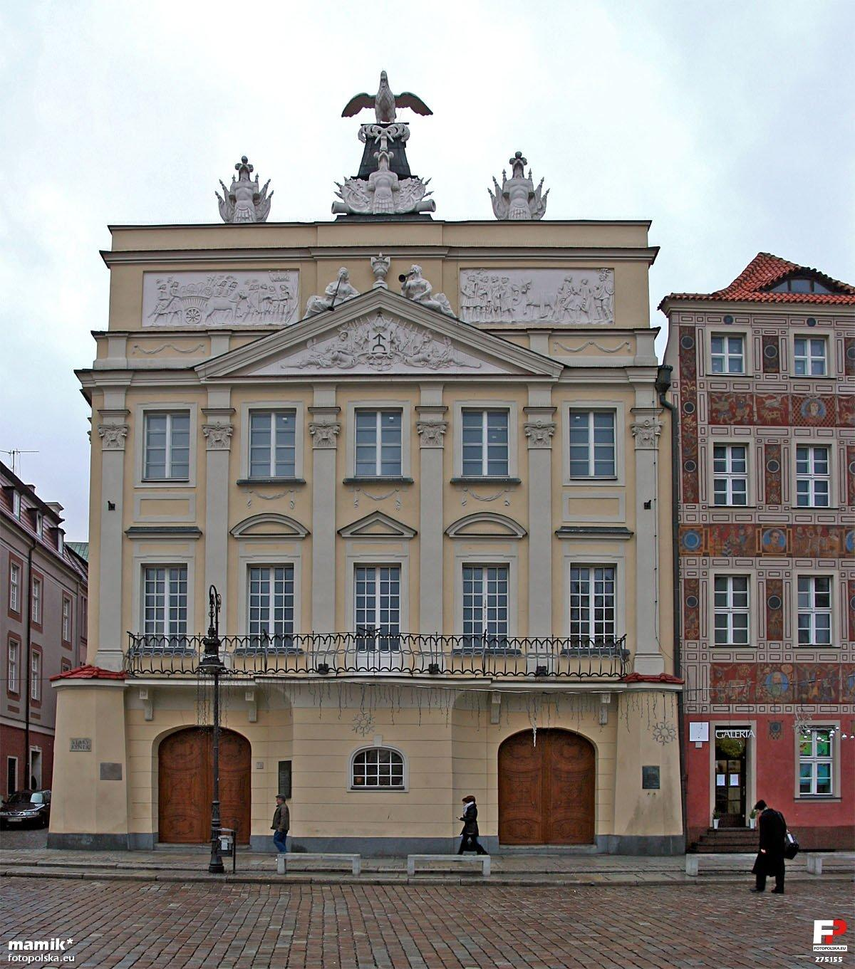 Kamienica Działyńskich